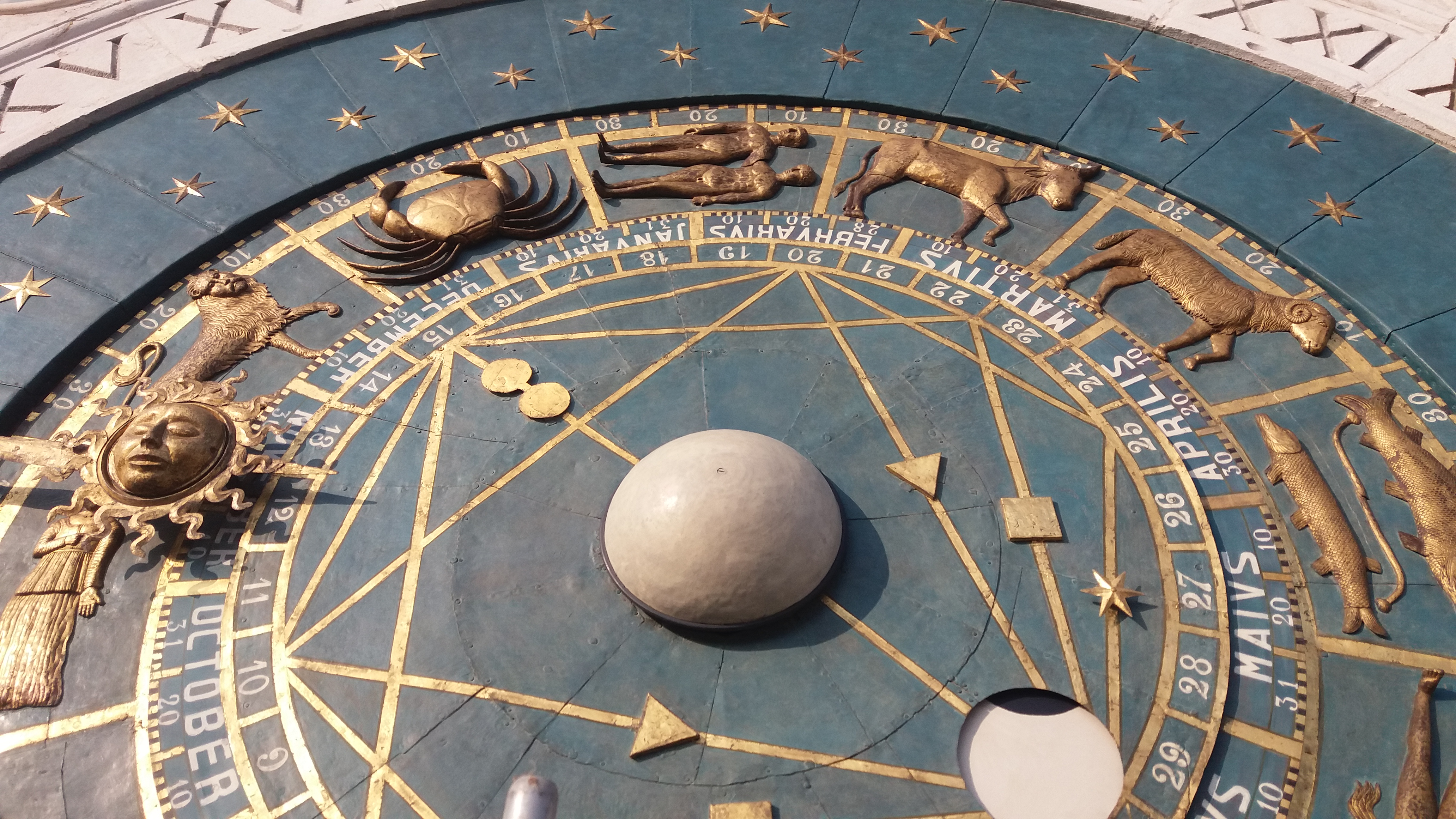 "Il quadrante dell'orologio - la terra al centro, le fasi lunari , i giorni, i mesi e i segni zodiacali"